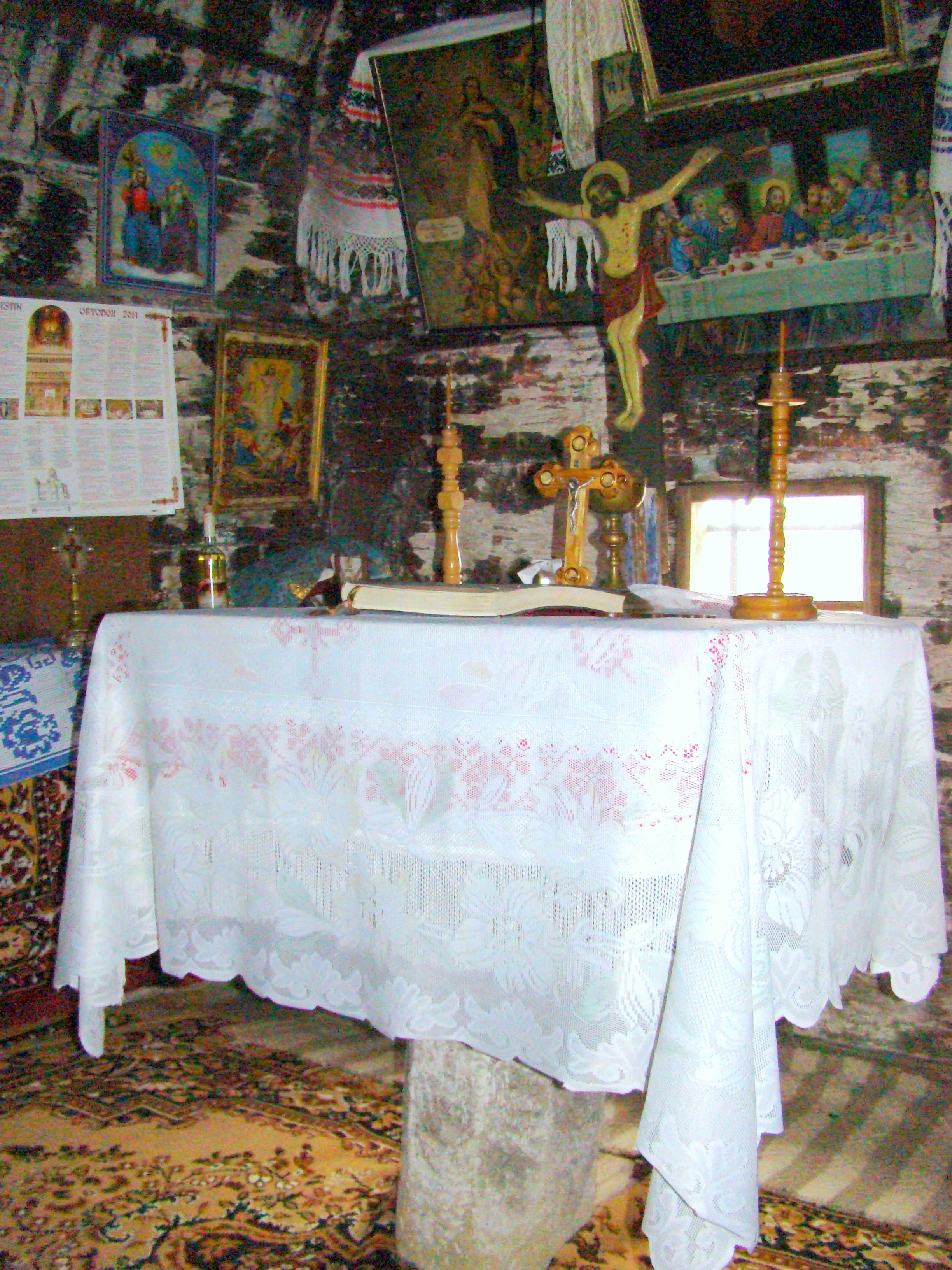 Biserica de lemn „Înălţarea Sfintei Cruci" din Pruneni